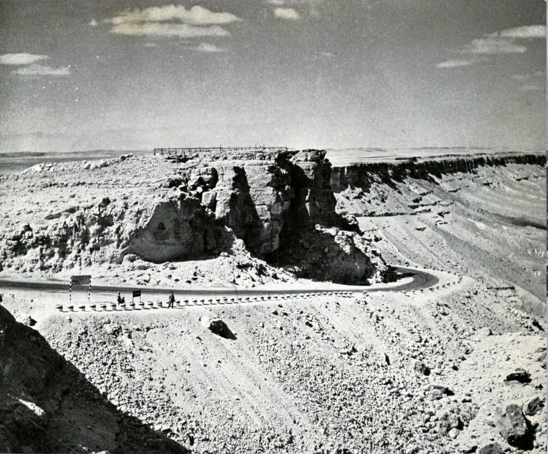 מעלה העצמאות בכביש אילת. הירידה ממצפה רמון למכתש רמון. נפרץ ע"י חיל ההנדסה בשנת 1953. הושלם ע"י מ.ע.צ. ב-1957-8